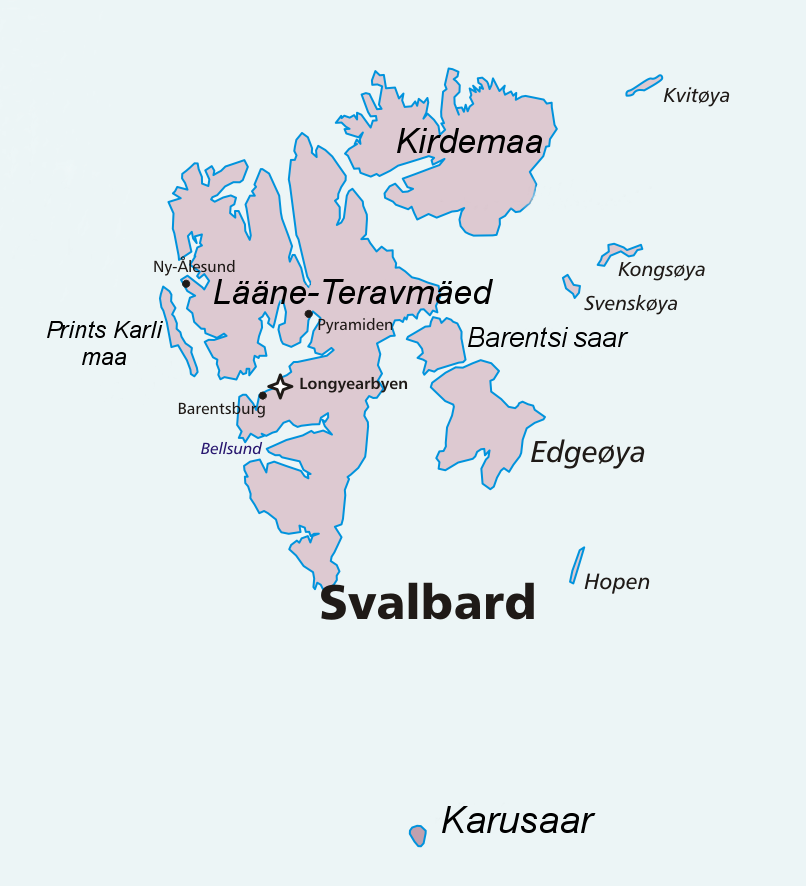 Svalbardi kaart